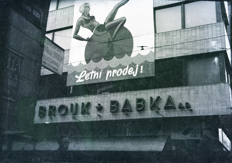 Obchodní dům Brouk a Babka (České Budějovice) s dobovou reklamou